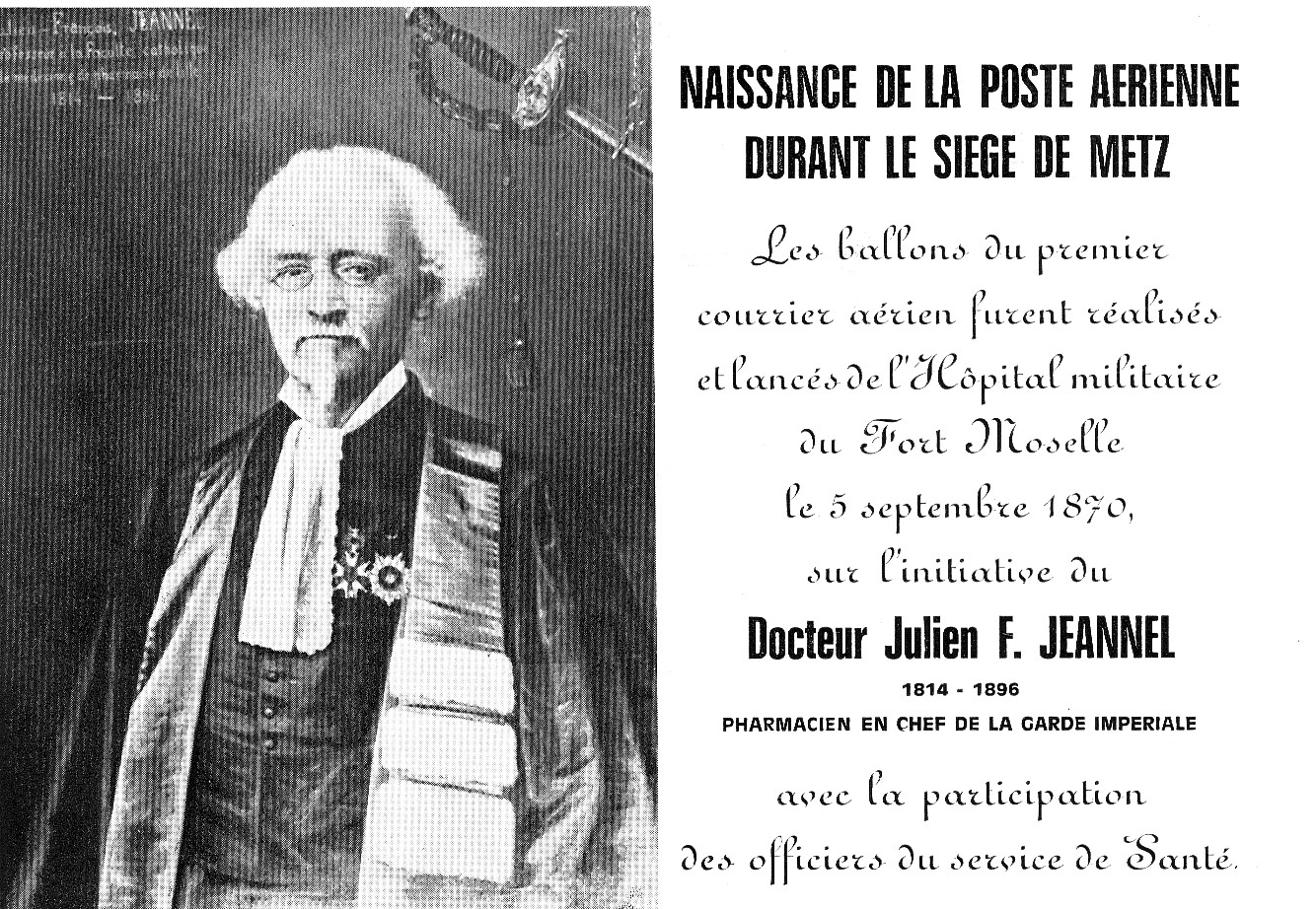 Carte commémorative de la Poste aérienne en hommage à Julien-François Jeannel. Portait à l’huile peint par V. Wittdoeck. Le tableau original est dans la salle de conseil de la Faculté de médecine de Lille.